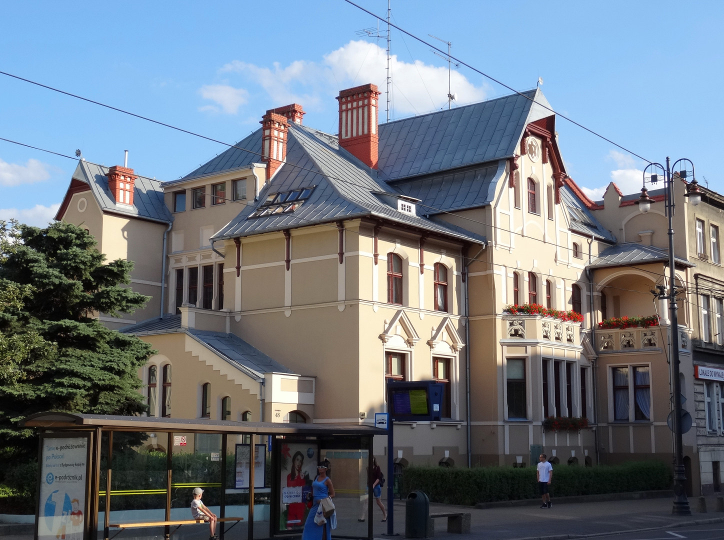 Willa Flora przy ul. Gdańskiej 28 w Bydgoszczy (1898, pierwszy właściciel Heinrich Dietz), od 1945 siedziba Pomorskiej Rozgłośni Polskiego Radia